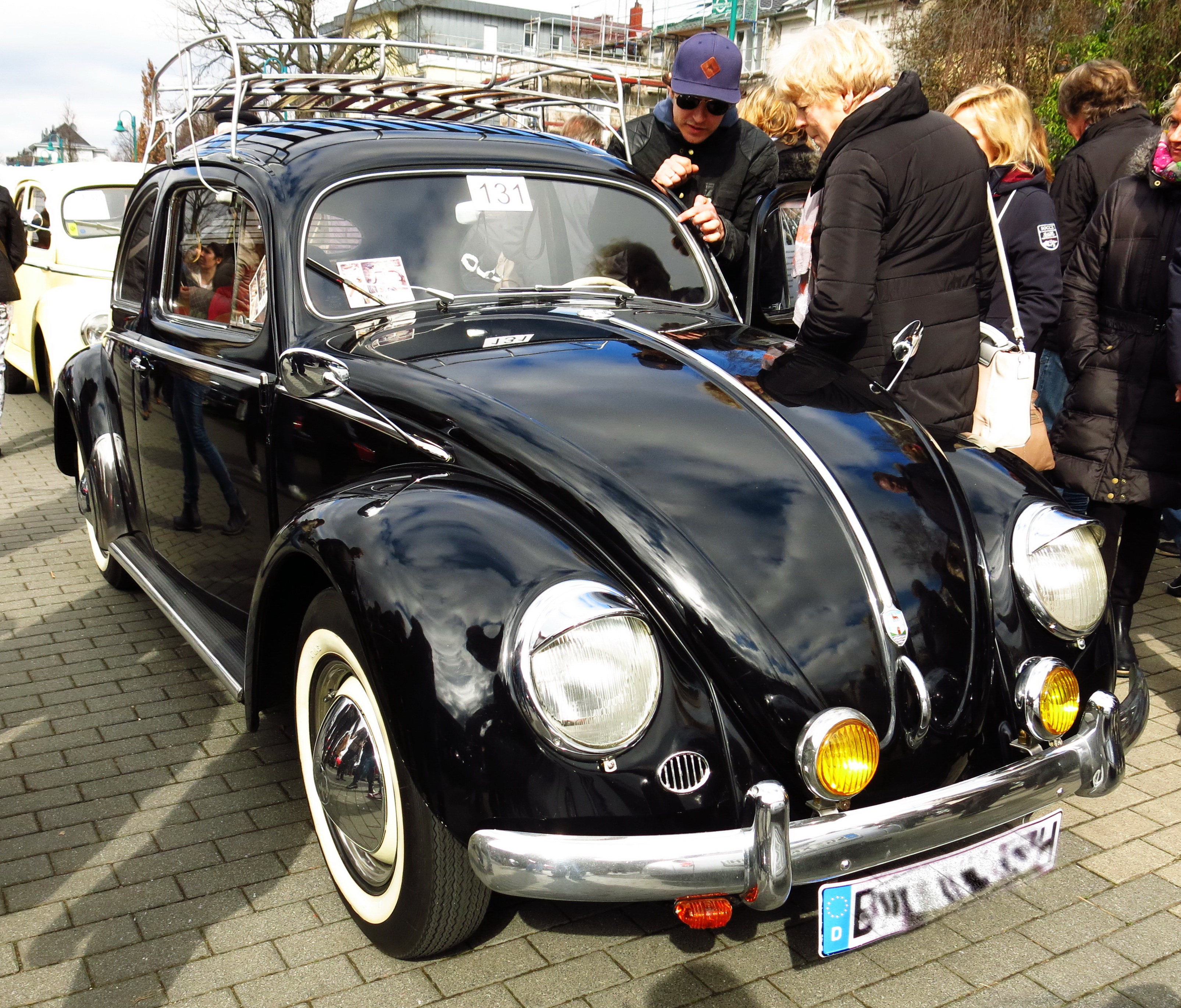 Brezelkäfer beim Oldtimertreffen "Beuel Classics" 2015 in Beuel.